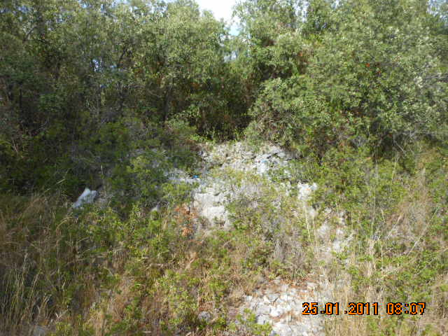 Vue du clapier 1 trouvé éventré sous un chêne vert - Saint-Vincent-de-Barbeyrargues (Hérault).